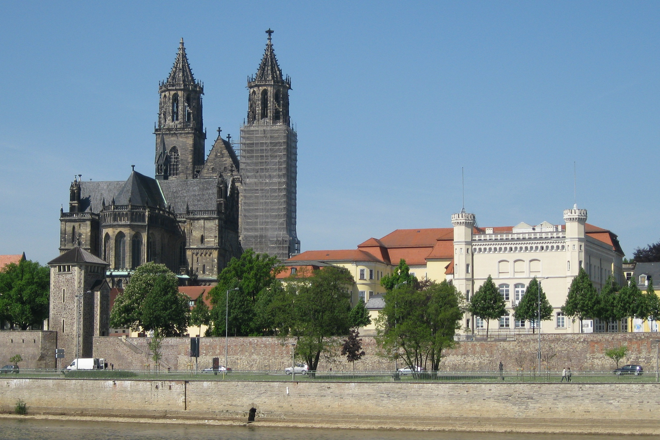 Fürstenwall und Wehrturm Kiek in de Köken, im Hintergrund Magdeburger Dom